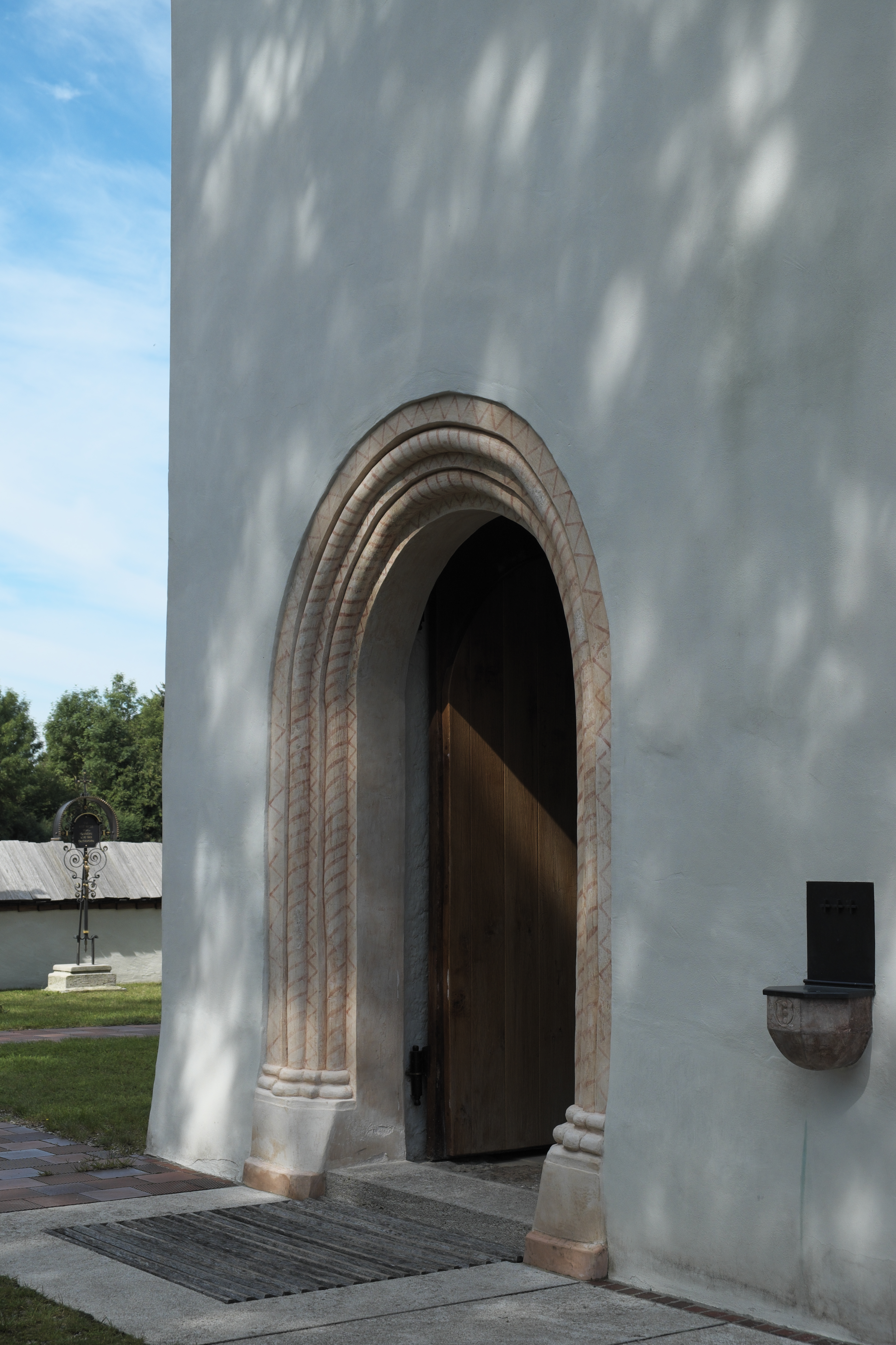 Katholische Filialkirche St. Aegidius in Keferloh (Grasbrunn) im Landkreis München (Bayern/Deutschland), Portal aus dem 14. JahrhundertThis is a photograph of an architectural monument.